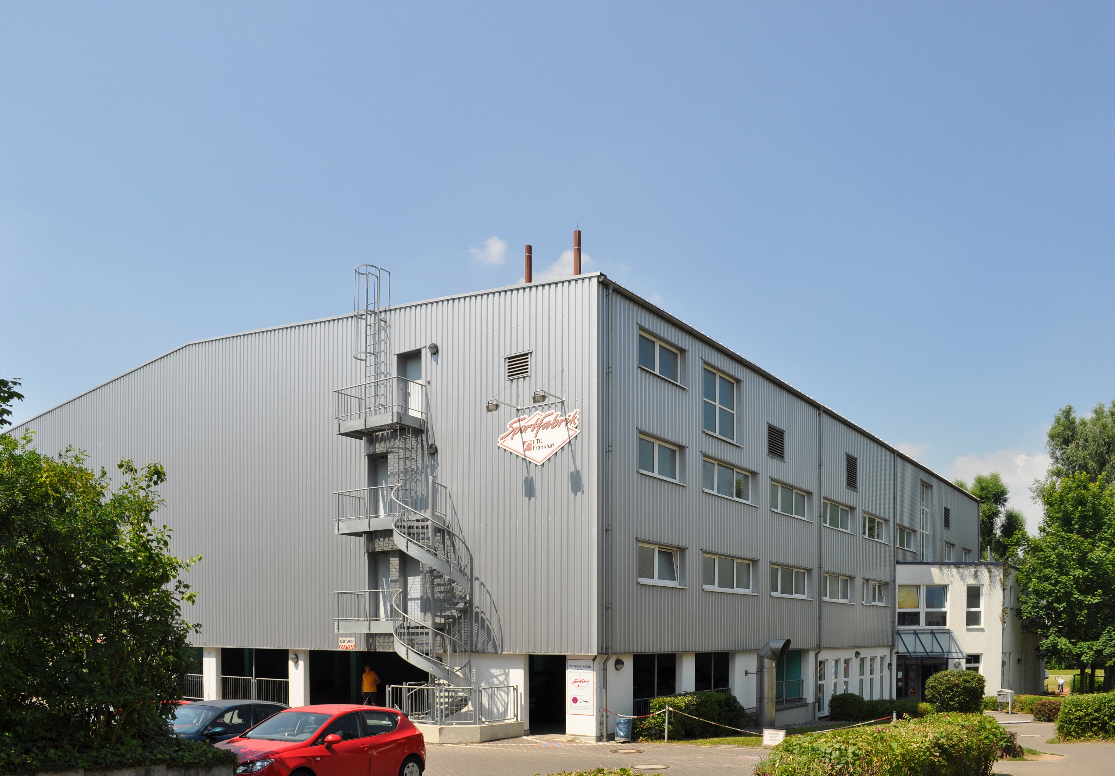 "Sportfabrik", Sporthalle der FTG Frankfurt in Frankfurt am Main Ortsteil Bockenheim, Ginnheimer Landstraße